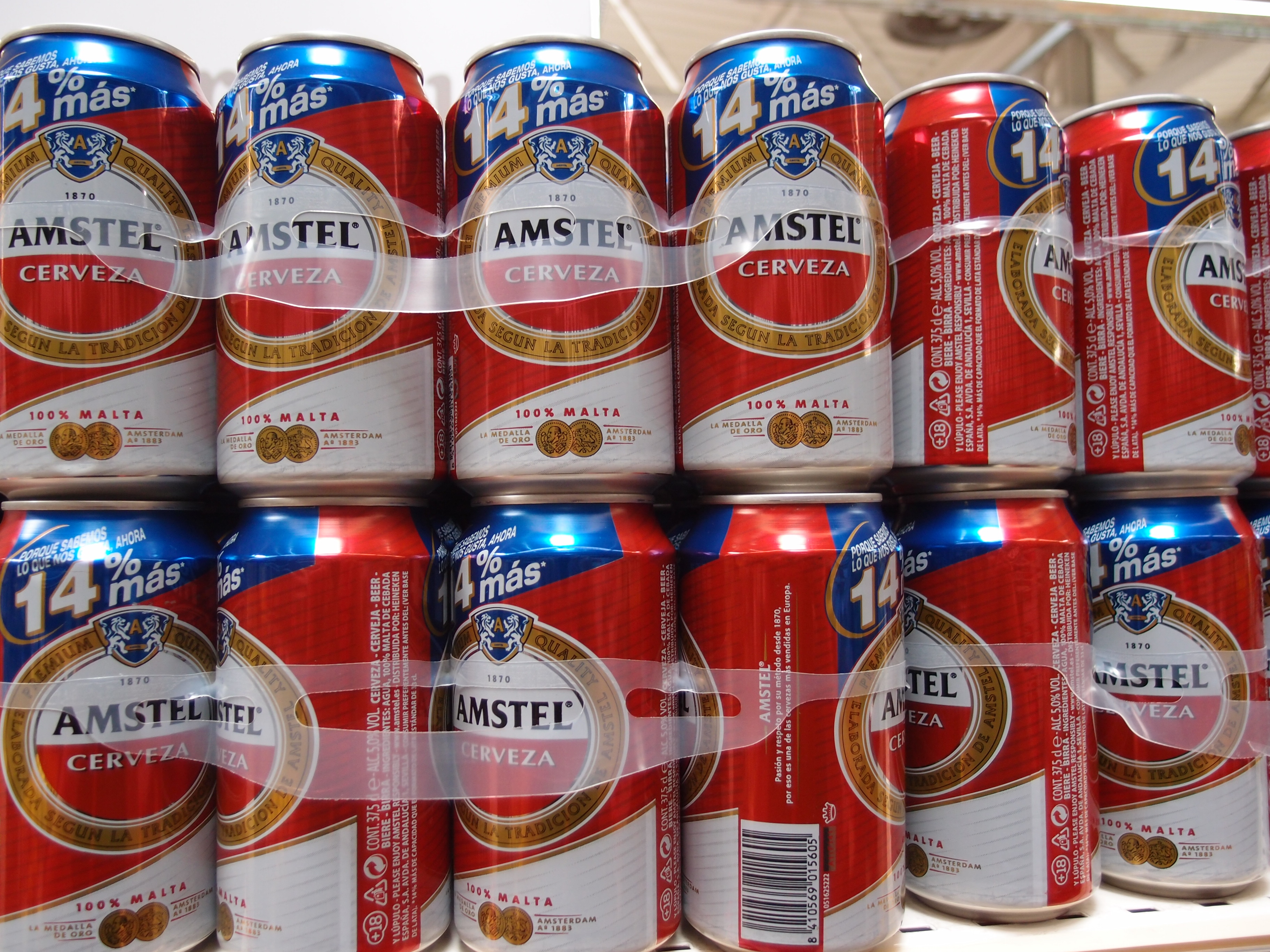 Amstel-Bier in Spanien (Cerveza Amstel) Datum: 29.09.2011 Urheber: M. Pfeiffer alias Gordito1869 Quelle: Privates Fotoarchiv des Urhebers